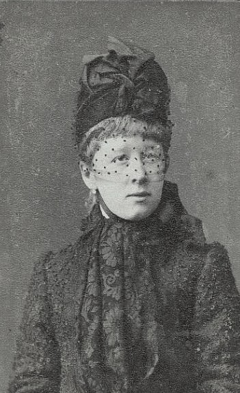 Анна Сергеевна Ушакова (1856— ?), в первом брака была замужем за публицистом Дмитрием Алексеевичем Хомяковым (1841—1919), разведясь с ним, вышла замуж за камергера графа Николая Александровича Бреверн де Лагарди (1856—1929).